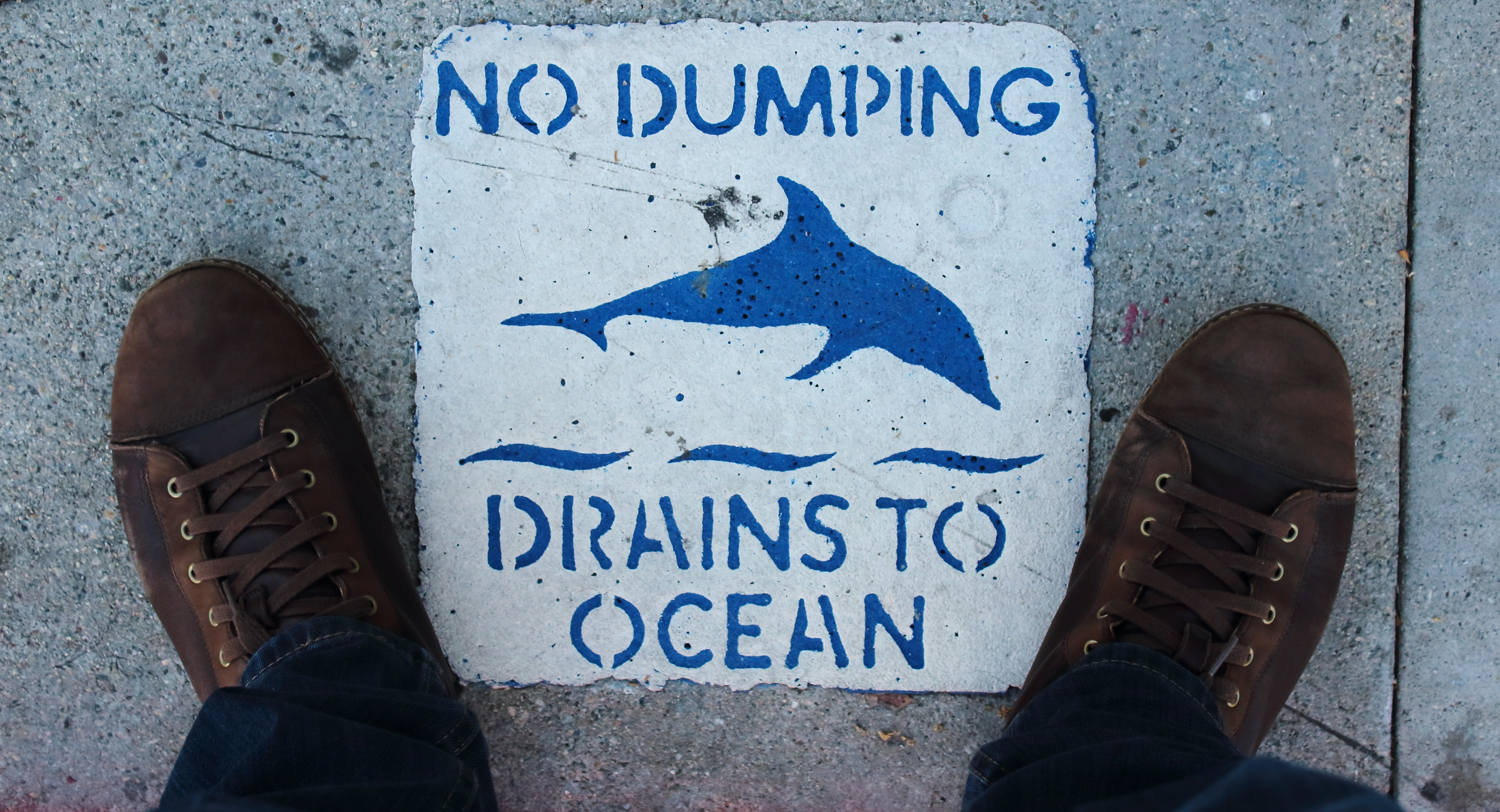 Señal de de advertencia.